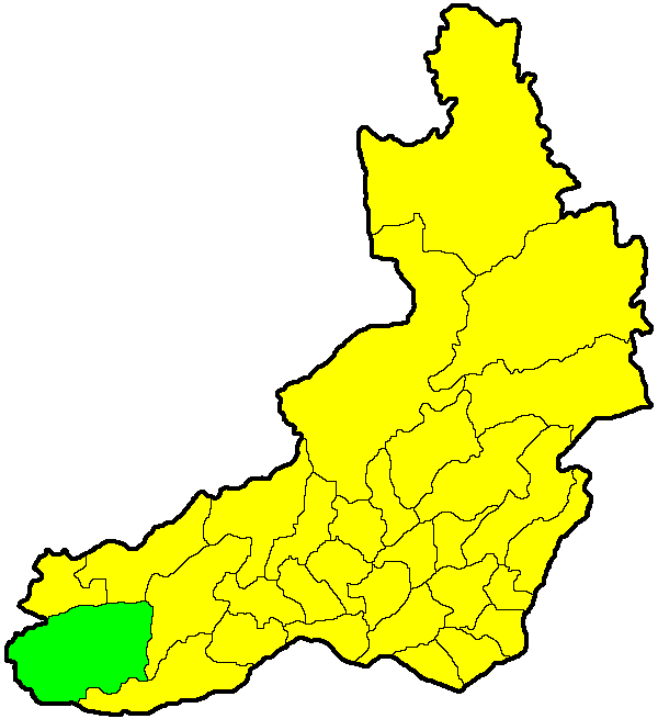 Красночикойский район на карте Забайкальского края